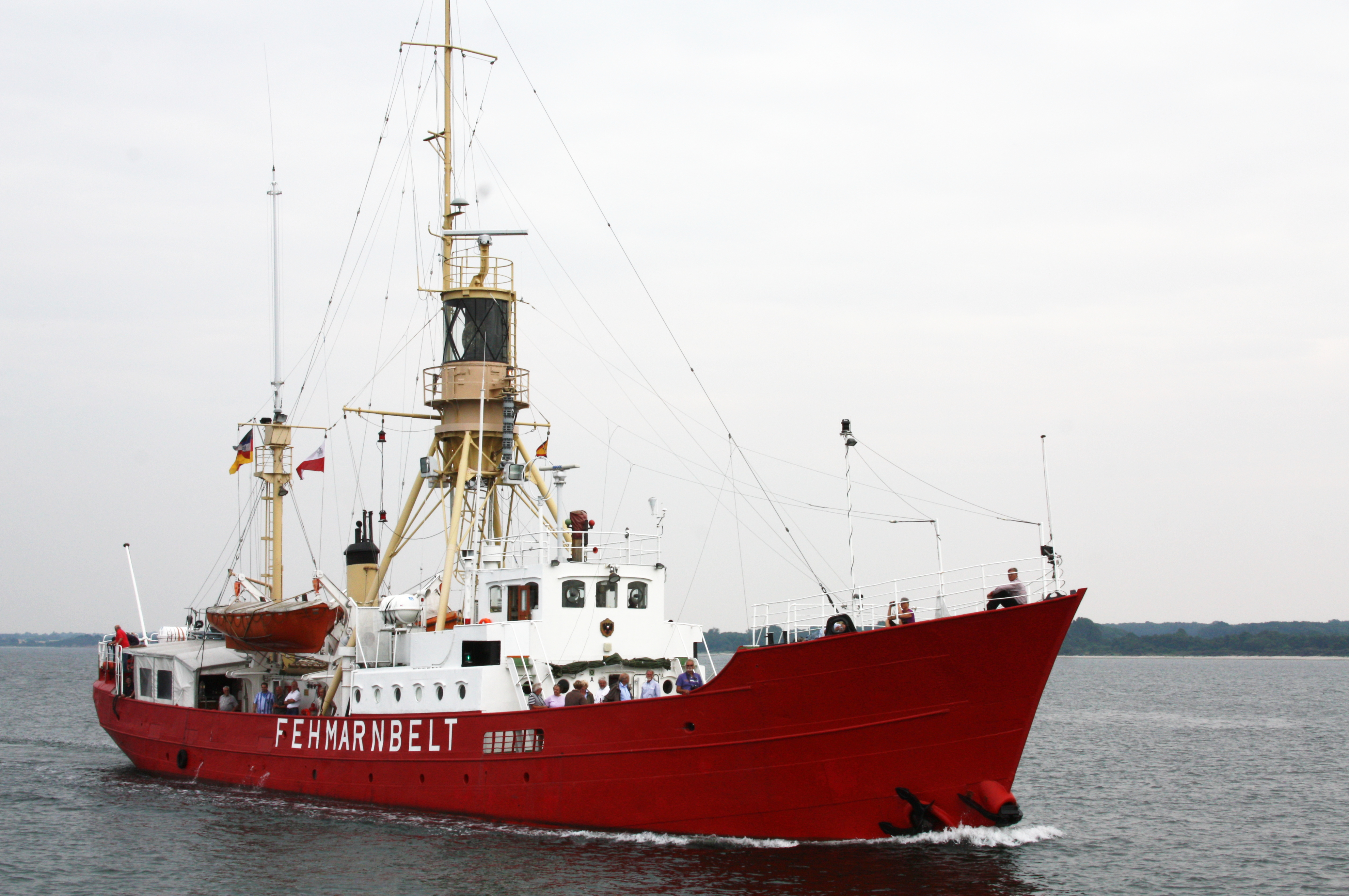 Fehmarnbelt, Schiff in Travemünde